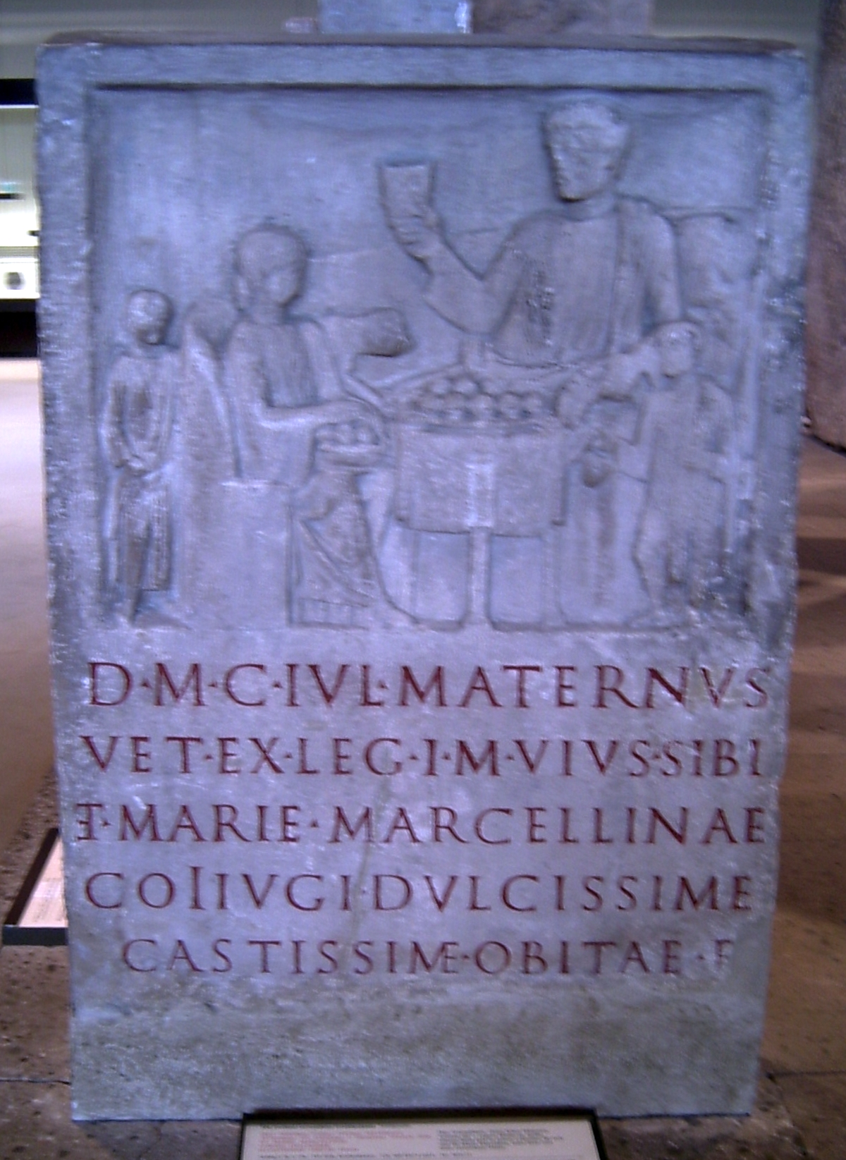 CIL XIII 8267.